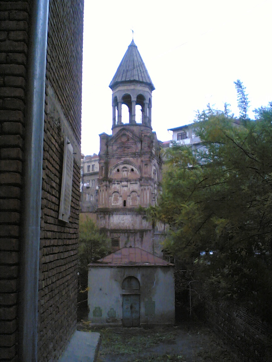 ვანქის სამრეკლო